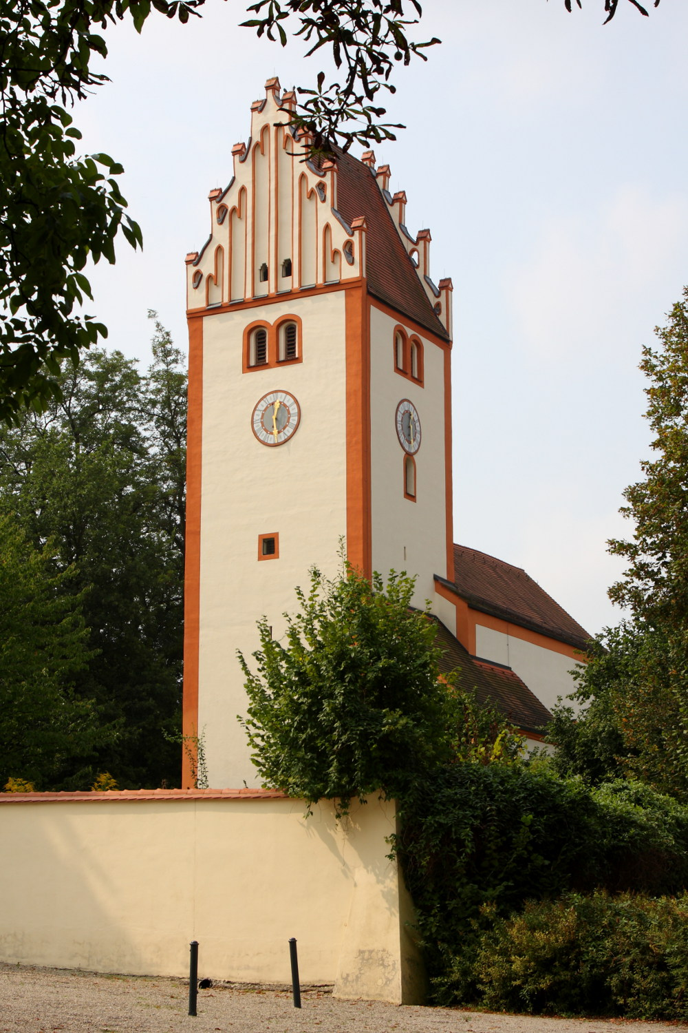 Alte kath. Pfarrkirche St. Johannes d. T.; Chorturmanlage mit romanischem Langhaus und gotischem Turm, barockisiert.This is a photograph of an architectural monument.